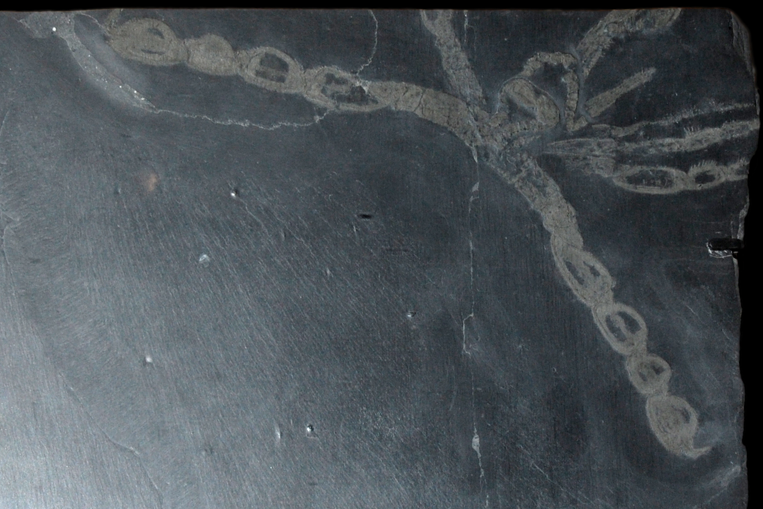 Naturhistorisches Museum Wien